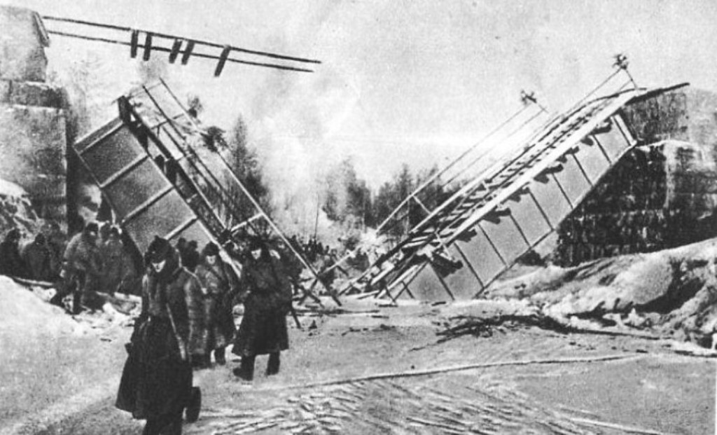 Мост неподалёку от Перякюля, 1940 год.